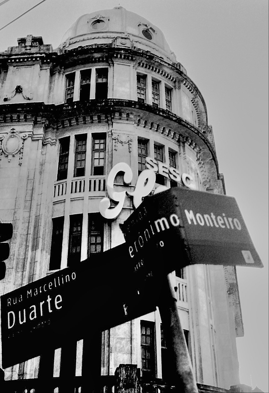 cine teatro glória